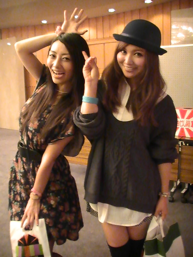 アップルパイン (2010年5月)